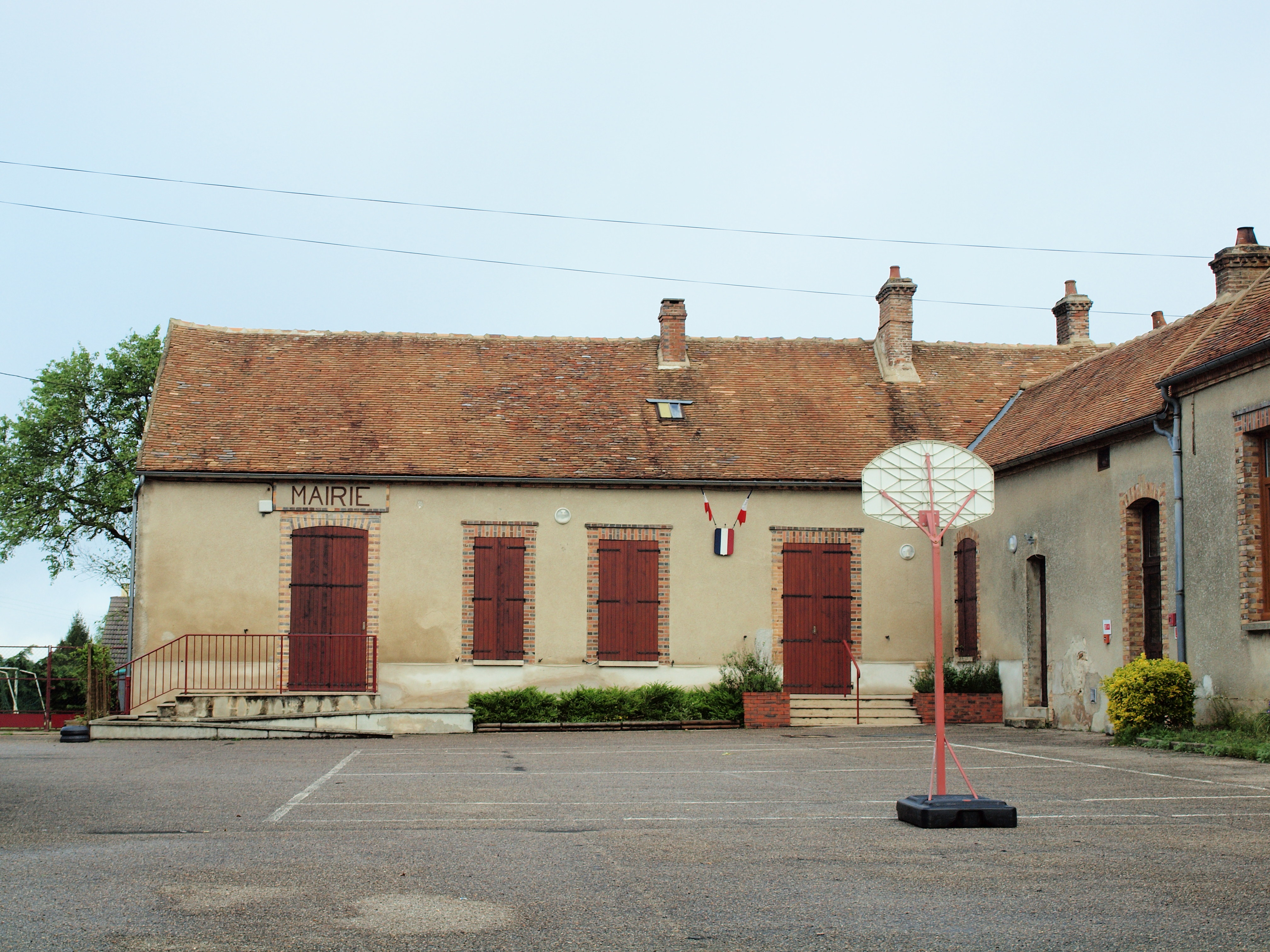 Lixy (Yonne, France)